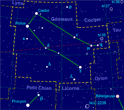 Carte pour la constellation des Gémeaux Produite à l'aide du logiciel PP3